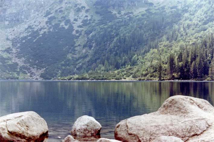 Morskie-Oko (het Oog van de Zee)- Foto gemaakt op 27 augustus 1993 (gedigitaliseerd 14 november 2006).